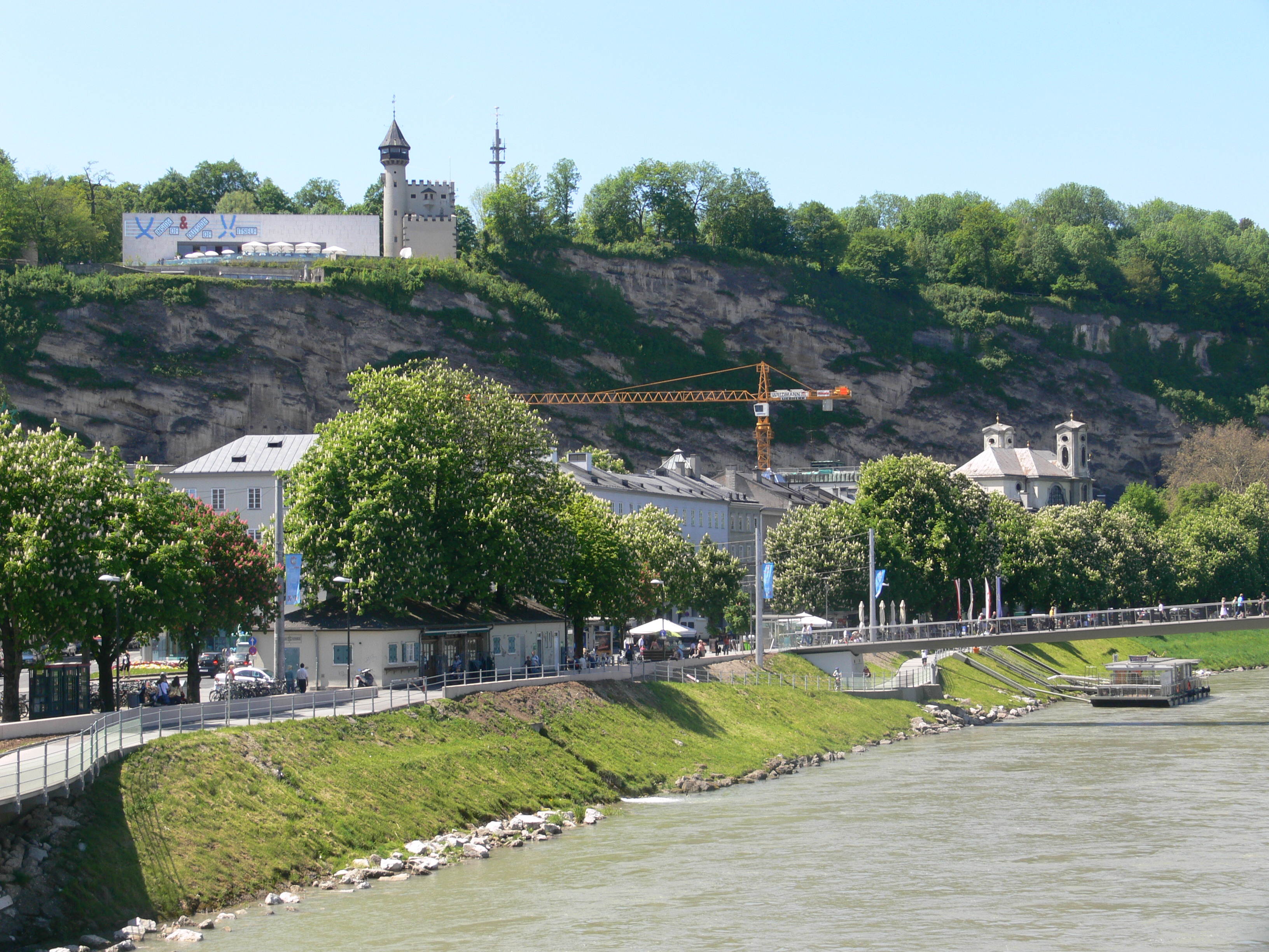 Salzburg; Blick über die Salzach zum Mönchsberg, rechts die Markuskirche